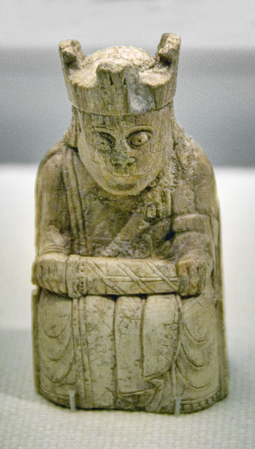 Esta pieza pertenece a un tesoro encontrado en la isla de Lewis, en Escocia, con un total de setenta y ocho piezas de ajedrez y catorce tableros. Está tallada en marfil de morsa y se cree que procede de Noruega, donde se habría fabricado en la segunda mitad del siglo XII. Fotografiada en la exposición Los pilares de Europa, en Caixa Forum Madrid. Pertenece al British Museum.